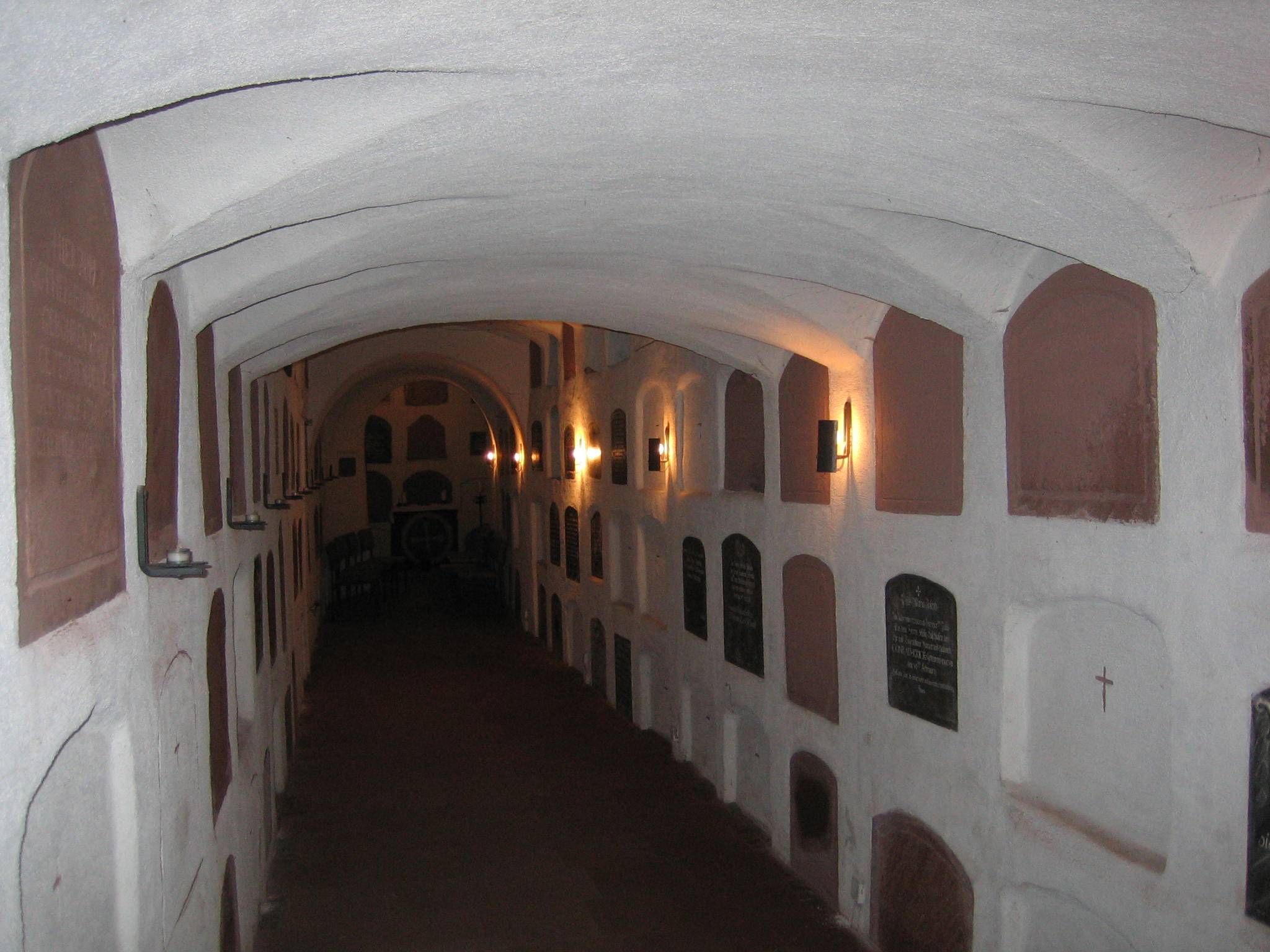 Backoffen Gräber unter der Kirche St. Ignaz Mainz